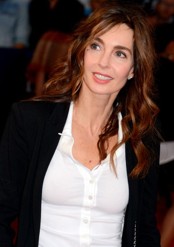 Anne Parillaud au festival de Deauville